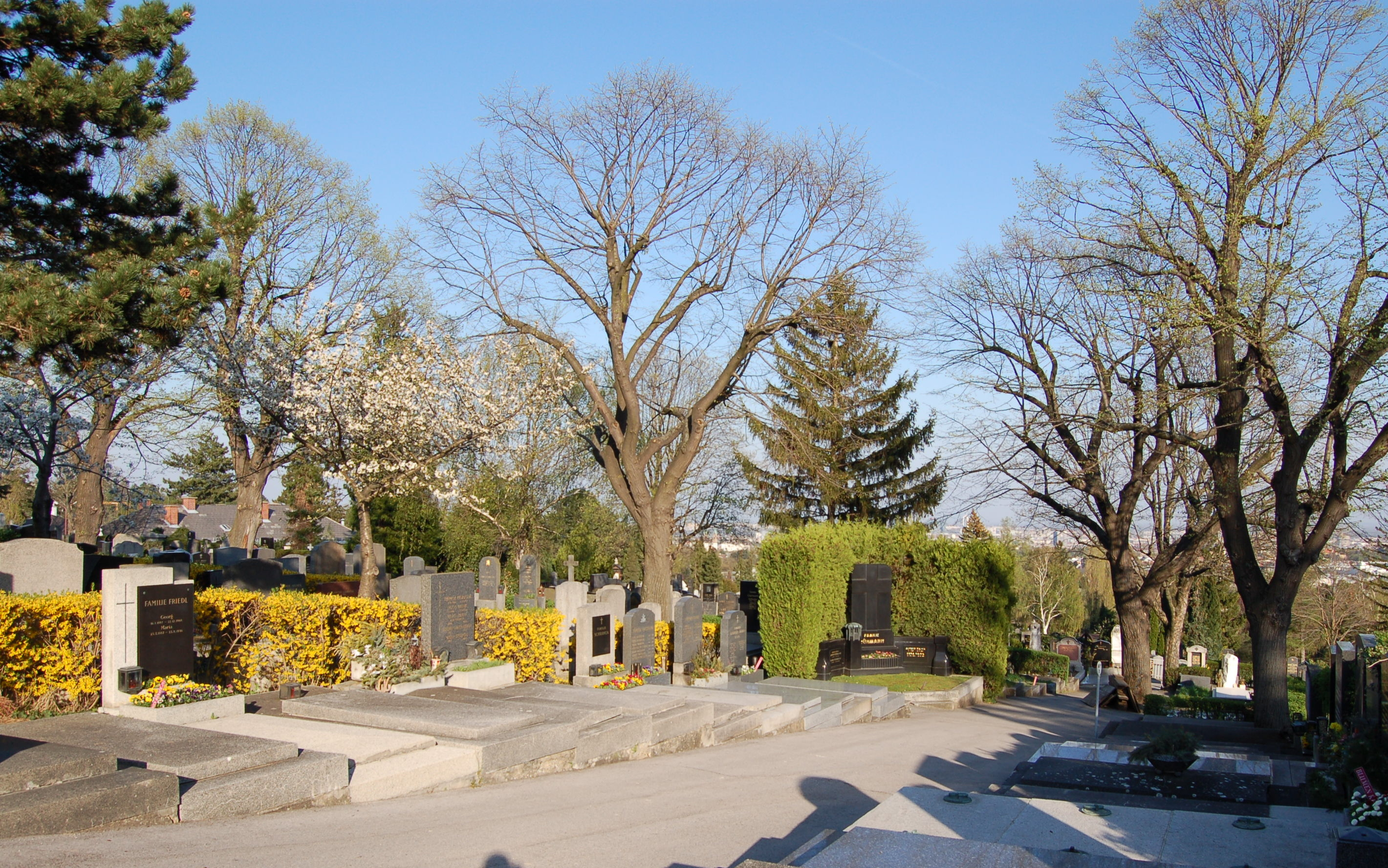 Sieveringer Friedhof, Blick auf den oberen Friedhofsbereich